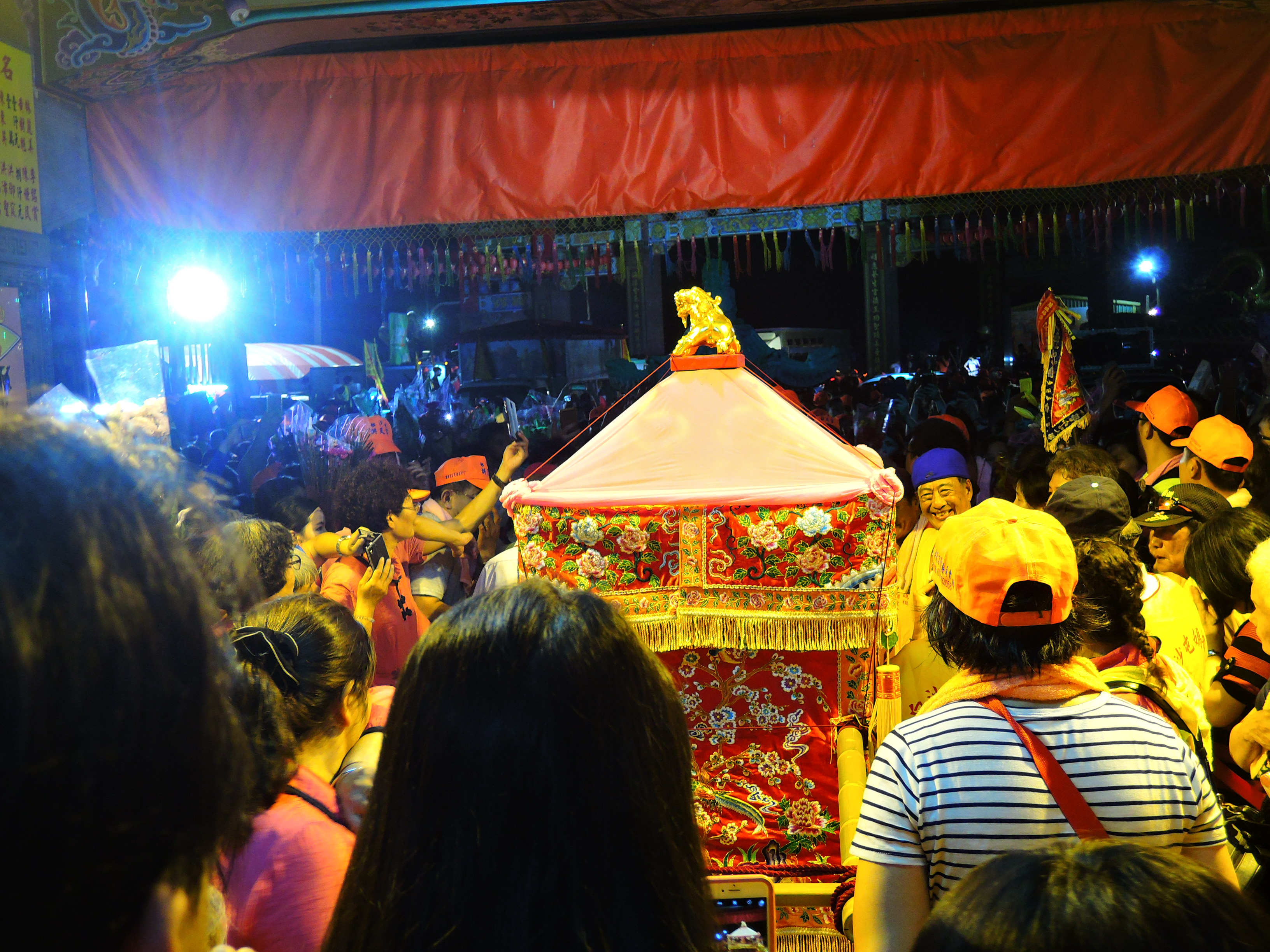 中文（台灣）: 媽祖神轎駐駕於彰化芳苑王功的福海宮